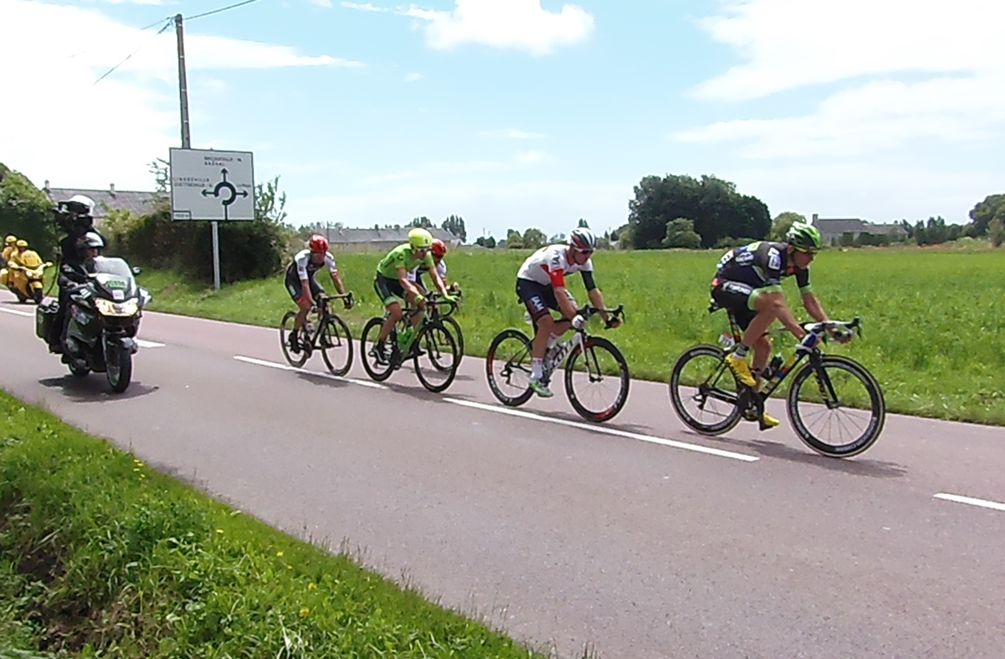 1re étape du Tour de France 2016, à Lingreville (km 74, Normandie, France). Les cinq échappés : Anthony Delaplace, Leigh Howard, Alex Howes, Jan Barta et Paul Voss.